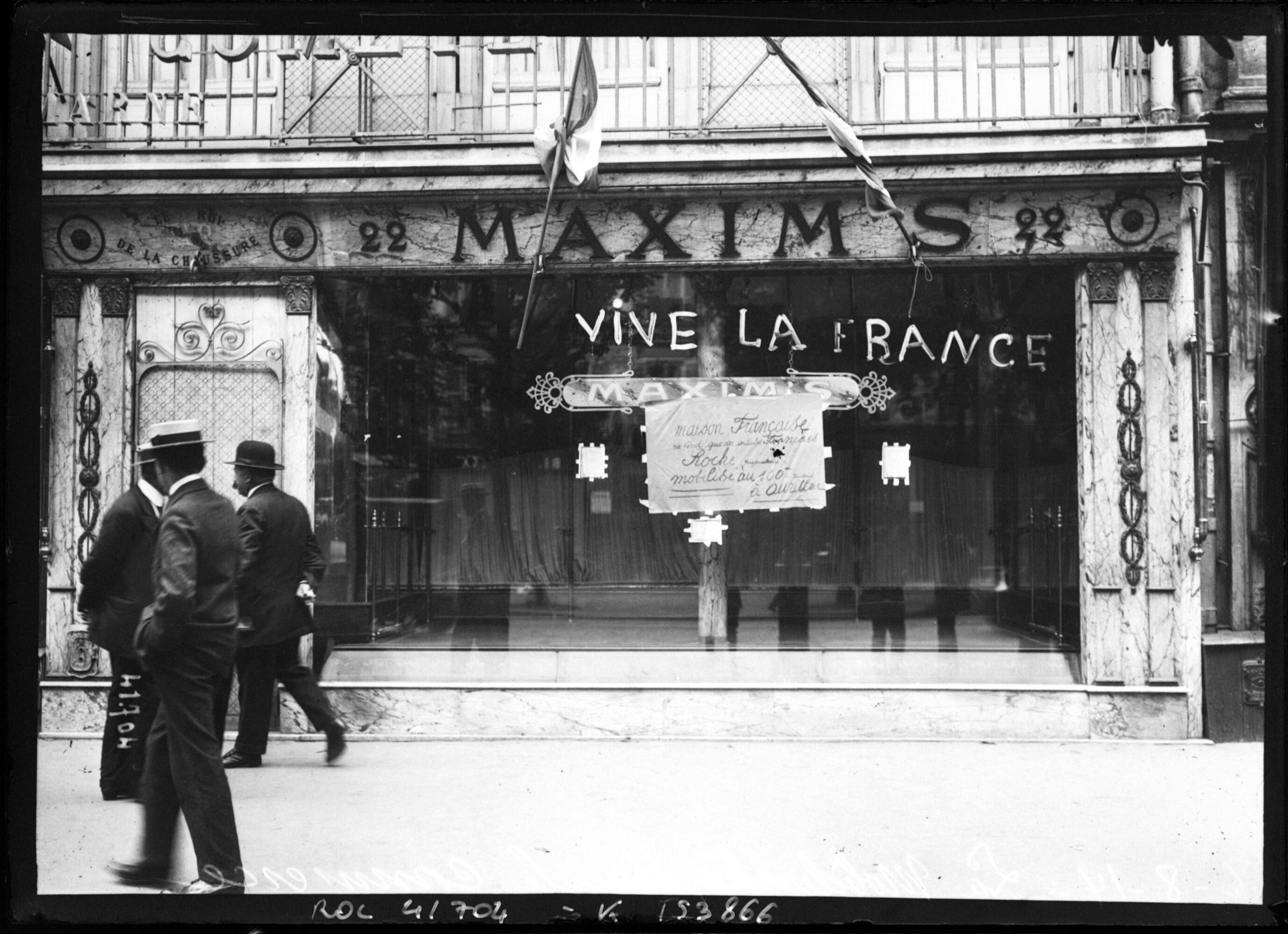 Vitrine du magasin Maxim's (un chausseur), à Paris.